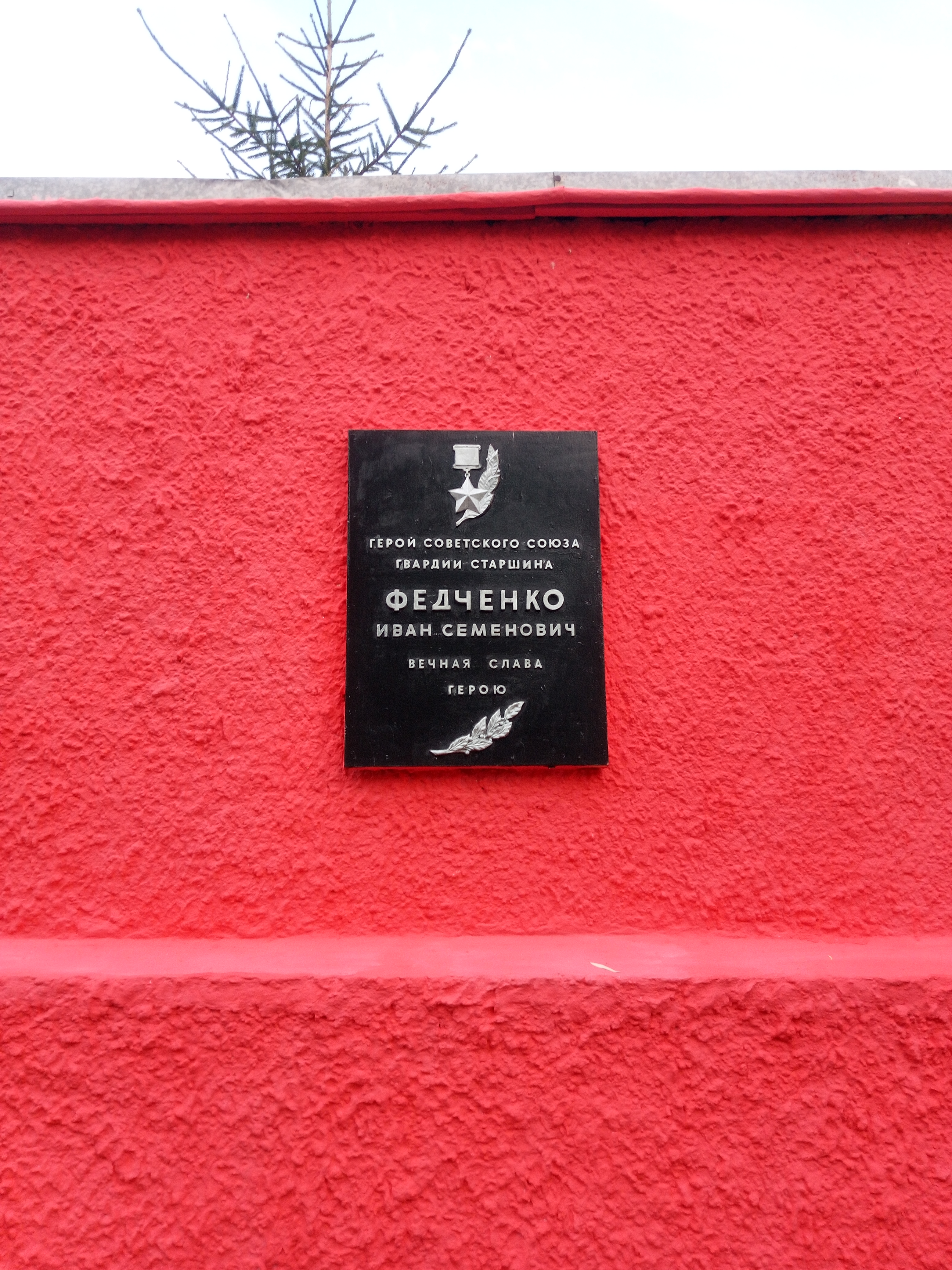 Мар’іна Горка. Мемарыял 8-ай танкавай дывізіі